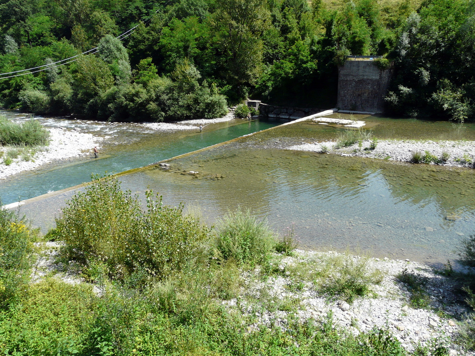 Il fiume Trebbia a Gorreto, Liguria, Italia